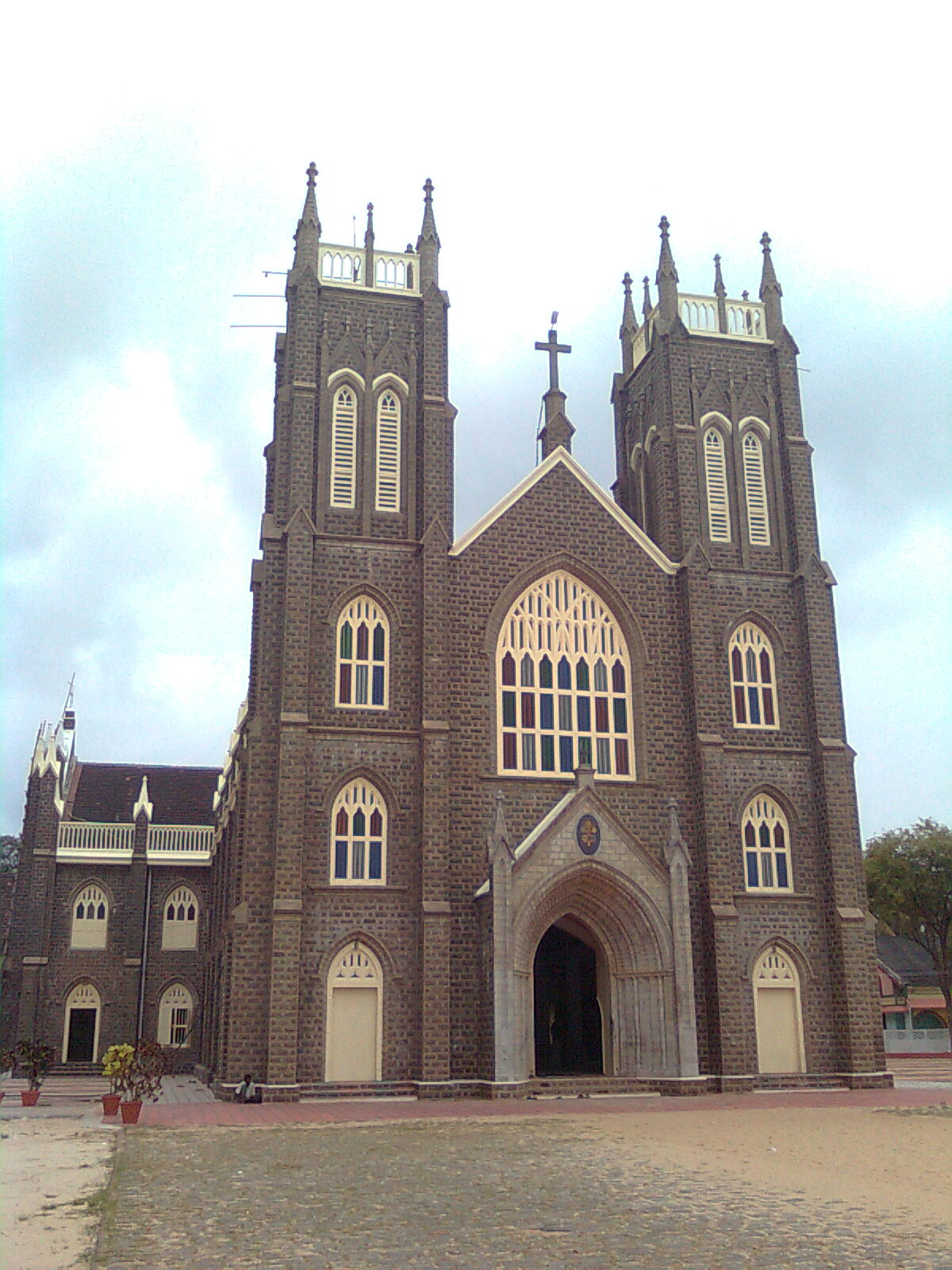 അർത്തുങ്കൽ പള്ളി മുൻവശത്തു നിന്നുള്ള കാഴ്ച്ച